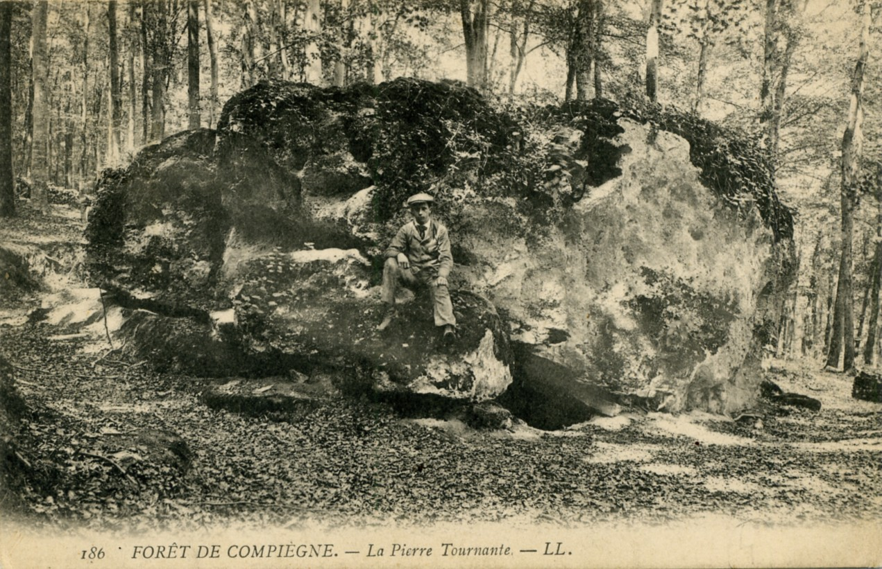 Carte postale, Edition E.D, envoyée en 1913